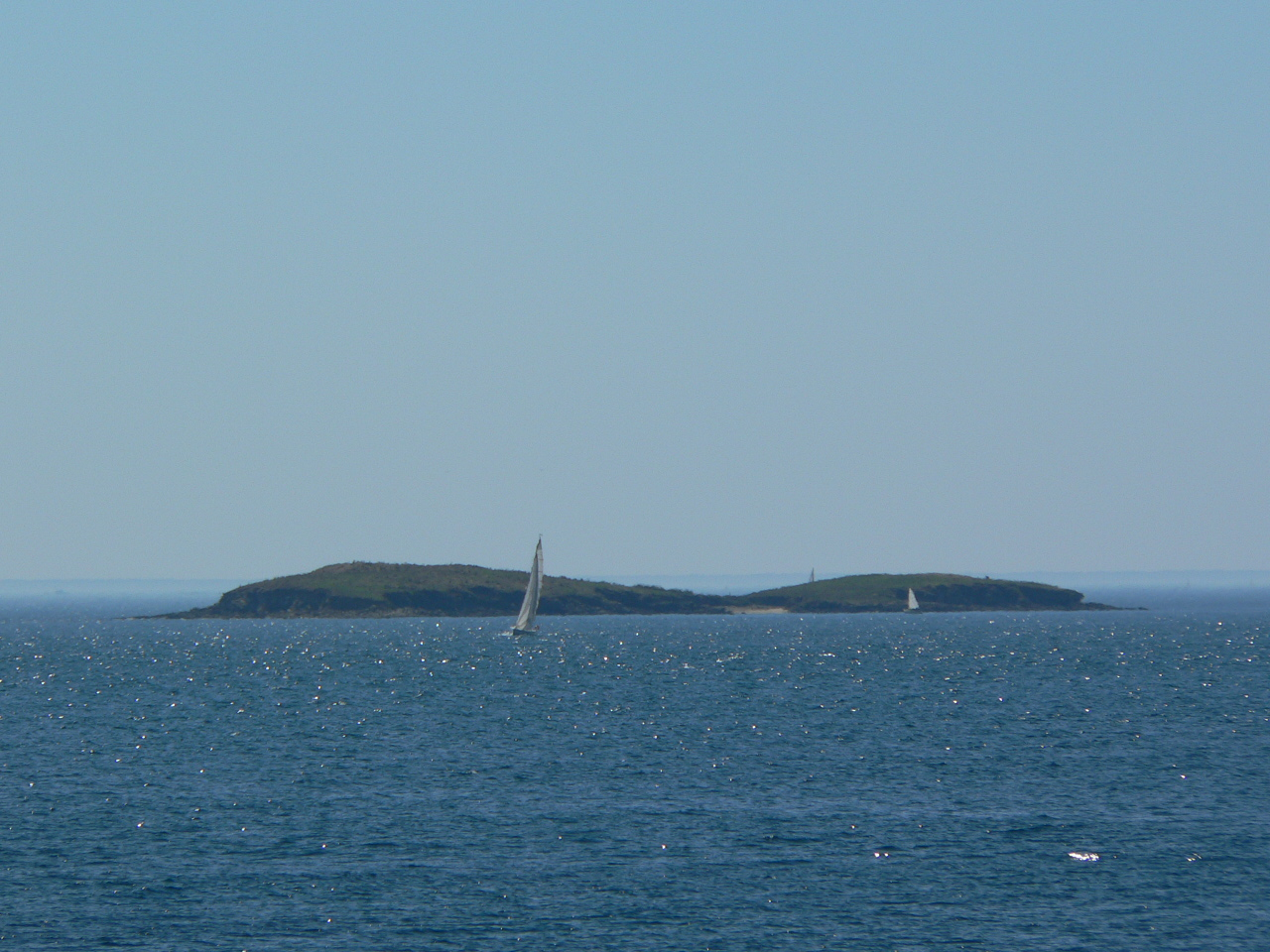 Méaban vue de la pointe de Kerpenhir (Locmariaquer)